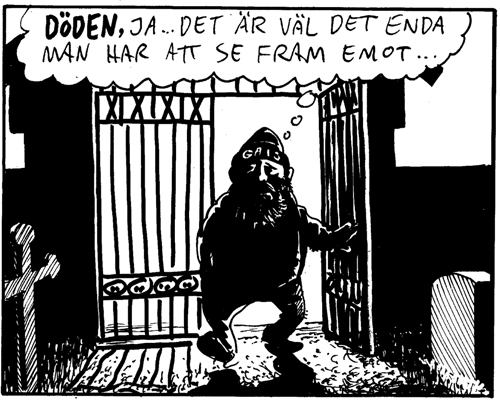 Skrubbefar, en av Joakim Lindengrens seriefigurer från Ett anstötligt liv som publiceras i Faktum.